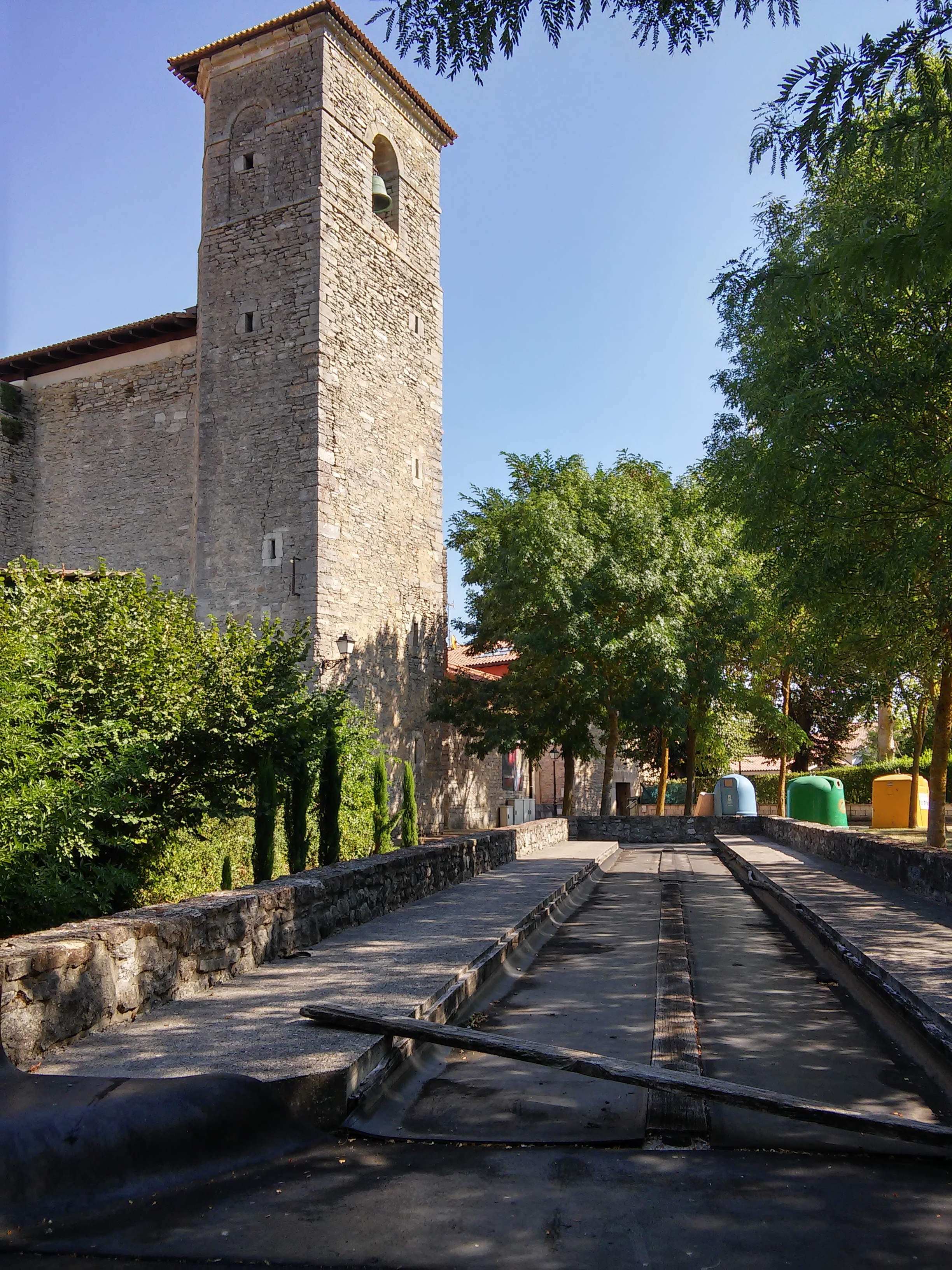 Andetxa Forondako eliza eta bolatokia (Gasteiz)